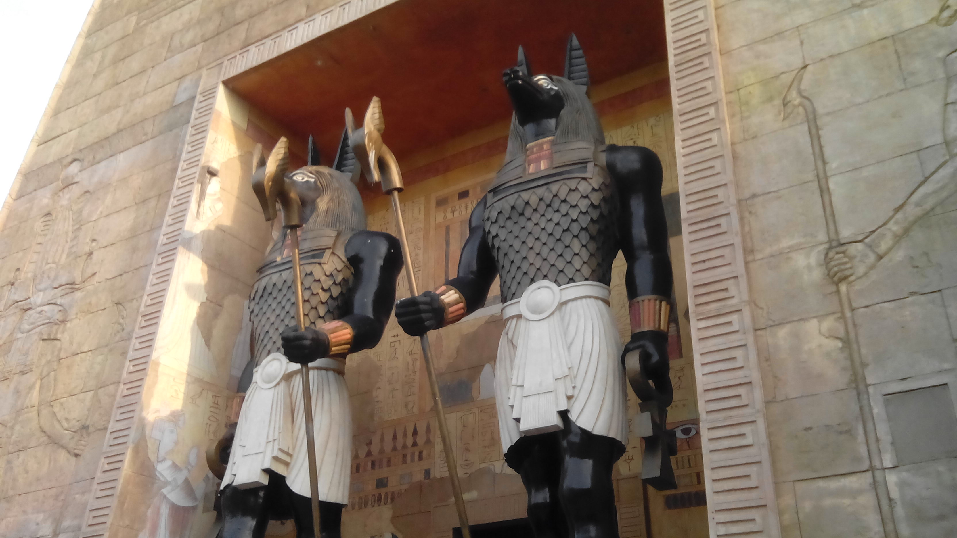 中文（香港）: 攝於「新加坡環球影城」的「古埃及」